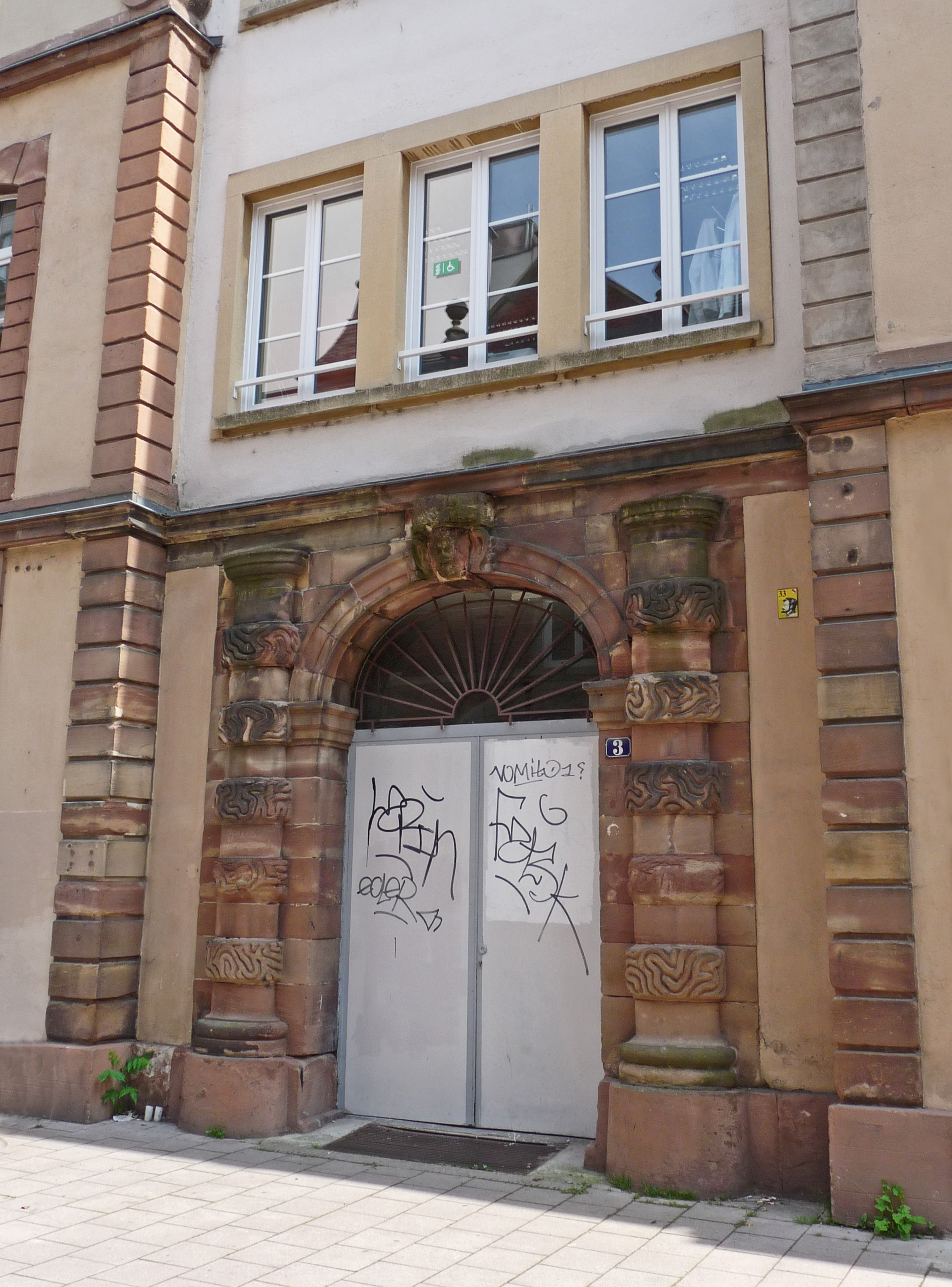 Strasbourg, 3 rue Pierre Bucher. Portail de 1880 réalisé à partir d'éléments de l'ancien corps de garde de la Porte des Juifs, élevé après 1755 et détruit en 1876. Colonnes engagées et baguées à bossages vermiculés.